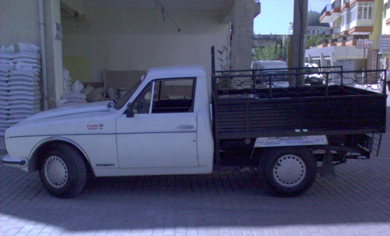 Türkiye'de seri olarak üretilen ilk otomobil markası Anadol'dan bir görünüm.